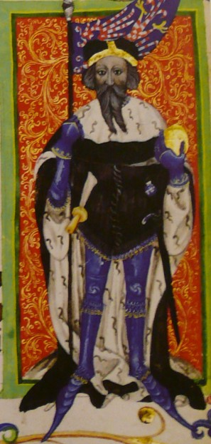 Jošt Lucemburský